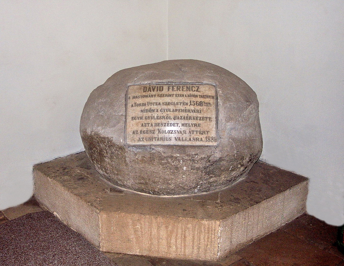 Cluj-Napoca, placă comemorativă pentru David Ferenc-Francisc, Biserica Unitariană (Bulev. 21 Decembrie 1989 nr.9)